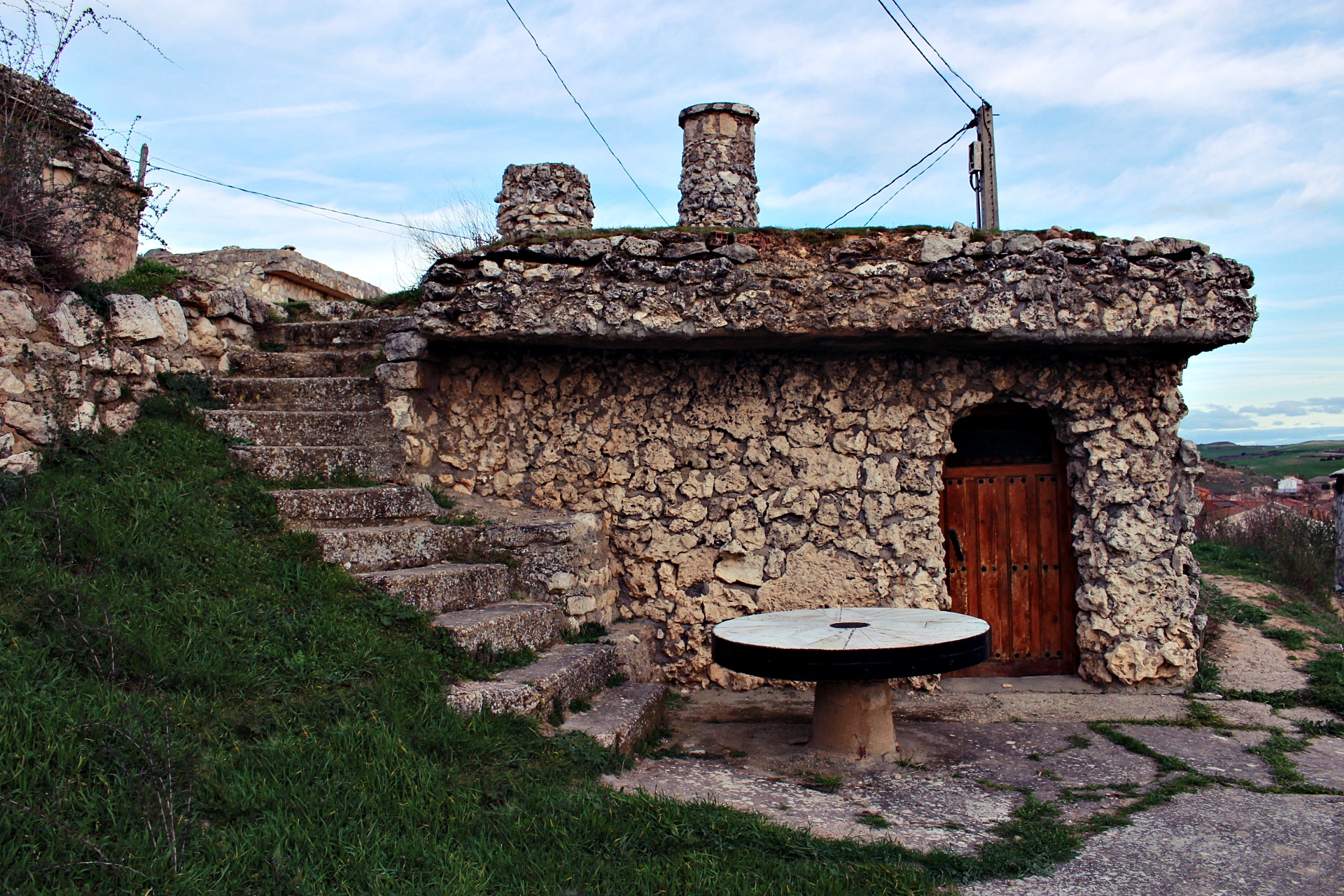 Bodega de Baltanás